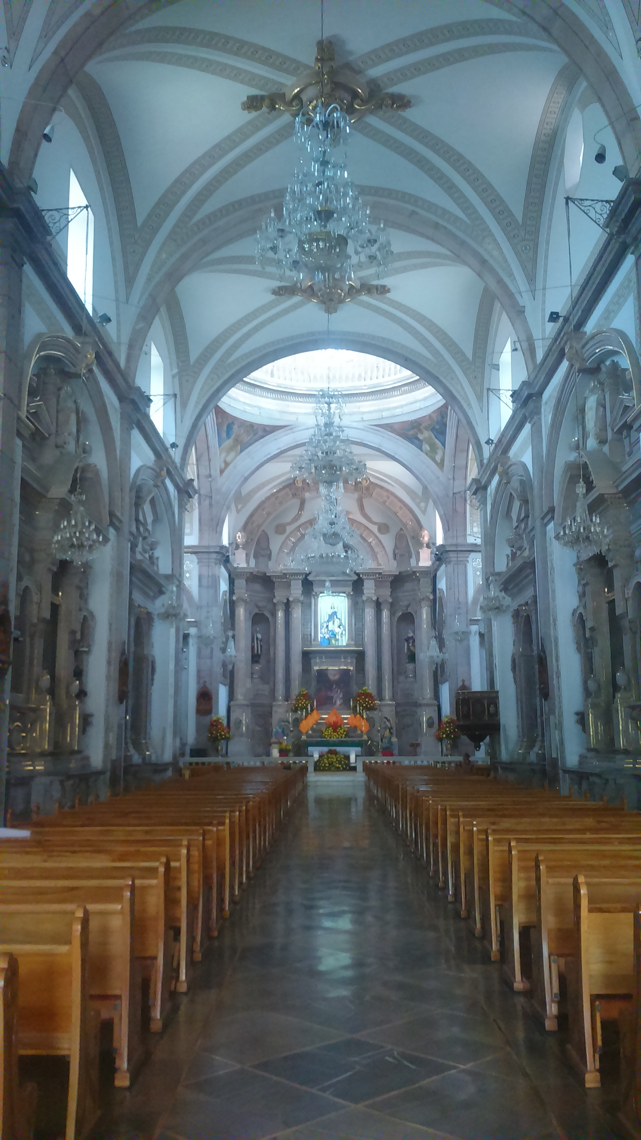 Panoramica interior del templo de San Francisco